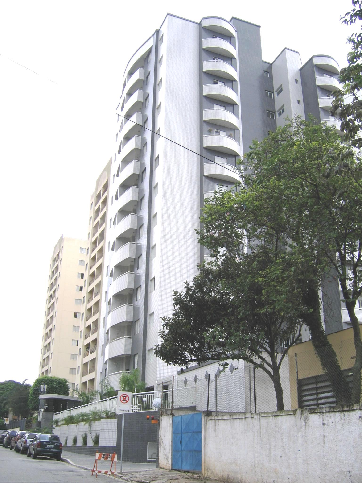 Prédio da rua Santa Leocádia, onde Isabella Nardoni foi lançada pela janela do sexto andar, lado esquerdo